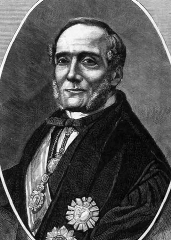 «Los nuevos ministros», en la revista española La Ilustración Española y Americana.